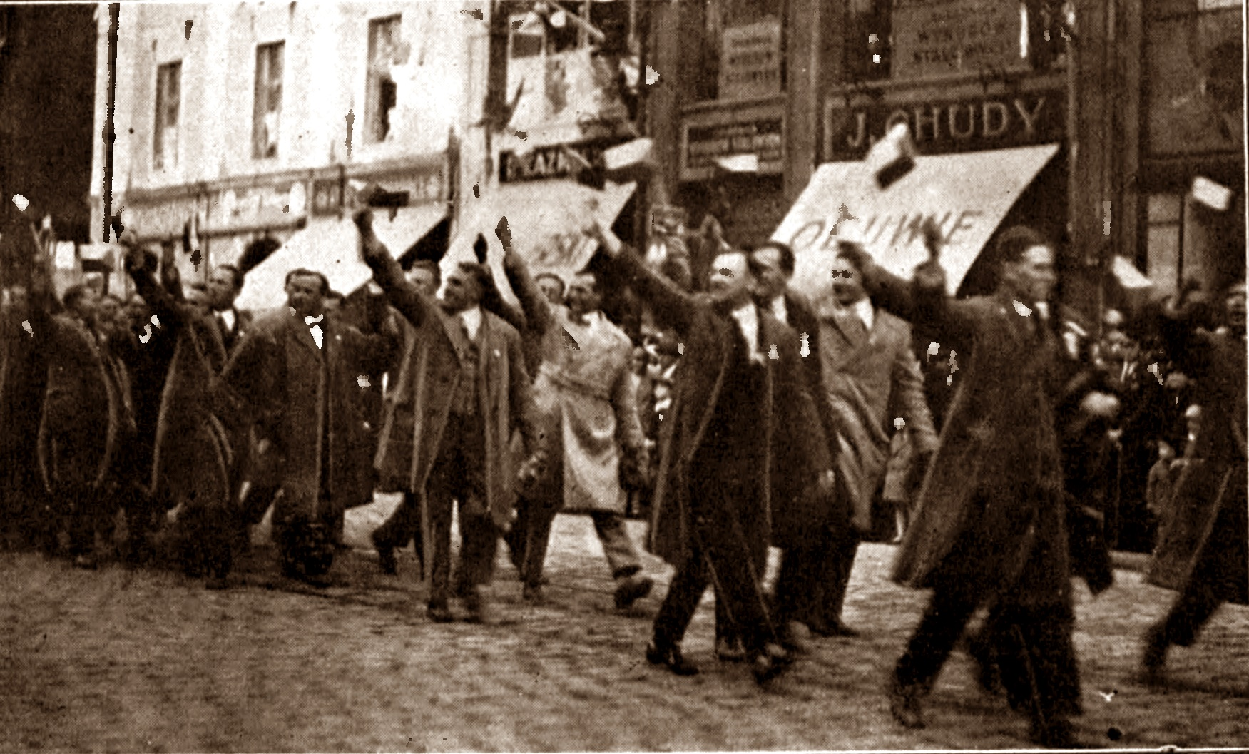 Poznań, Wszechsłowiański Zjazd Śpiewaczy: śpiewacy z Czechosłowacji składają hołd Prezydentowi RP